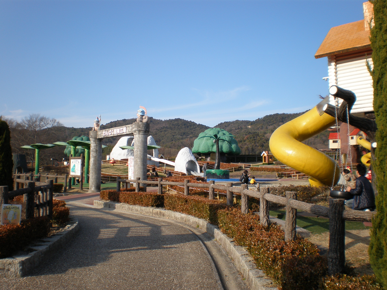 愛知県小牧市の市民四季の森にある"わんぱく冒険広場"